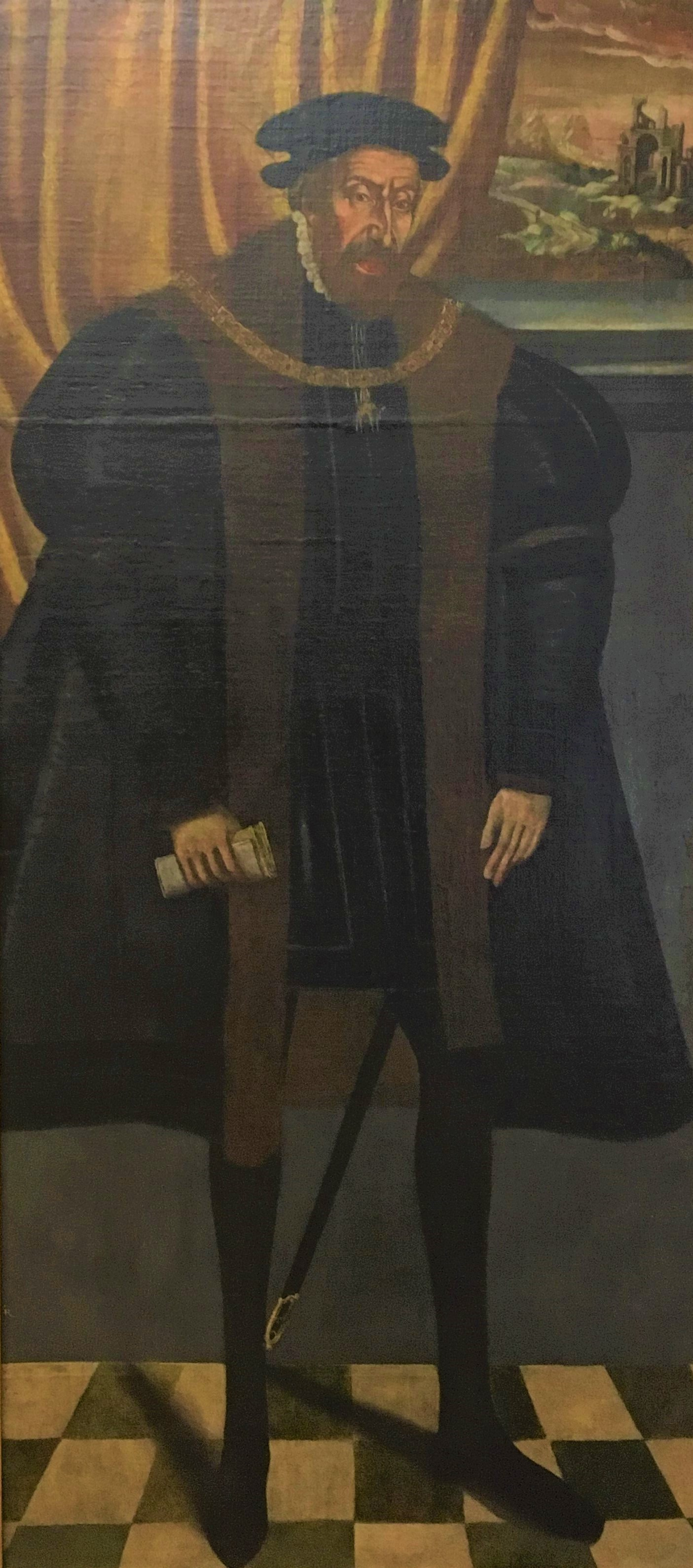 Císař Ferdinand I. Habsburský, český král. Předpokládá se, že v pravém horním rohu je jedno z prvních vyobrazení Prahy.